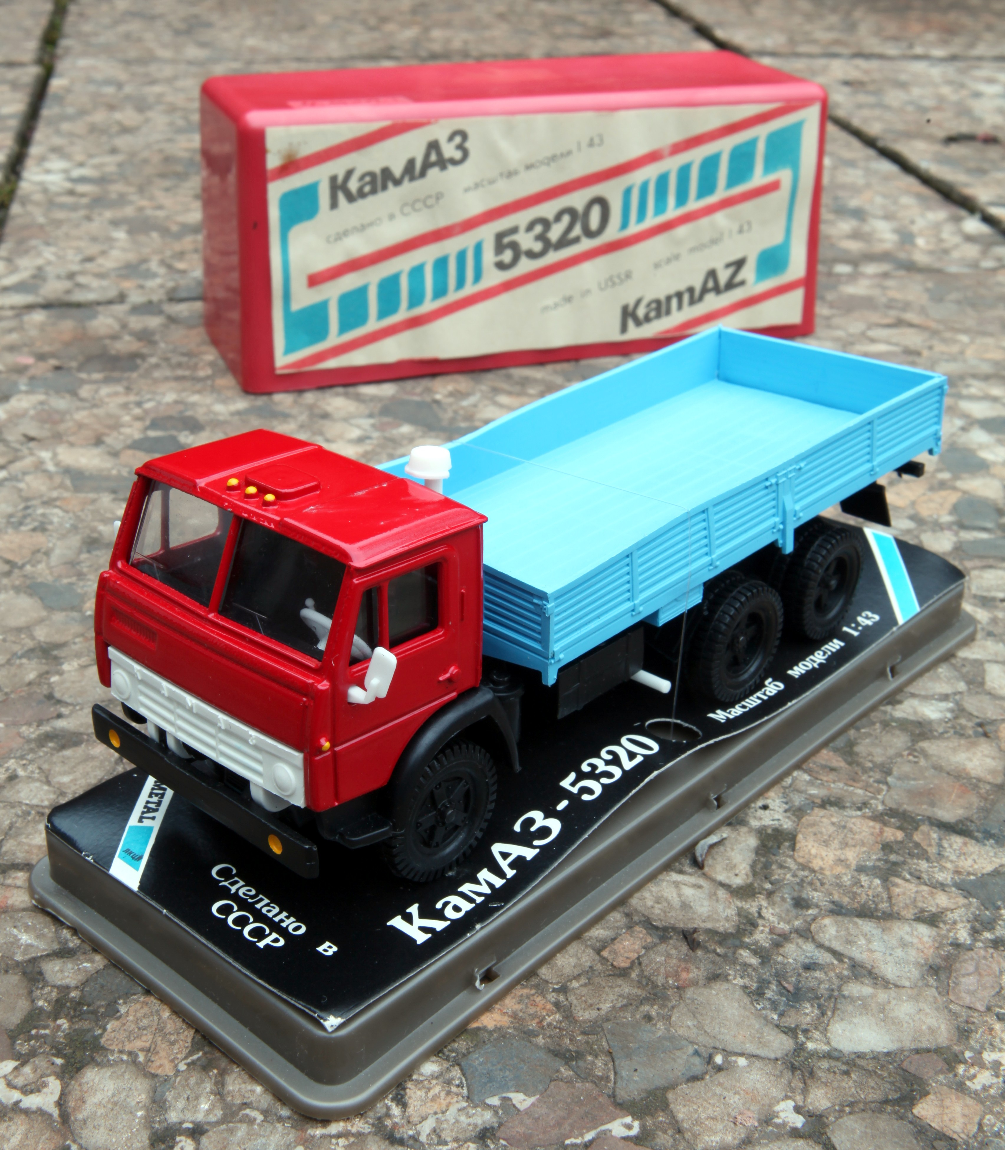 Kamaz kama3 5320 truck made in USSR scale model 1/43